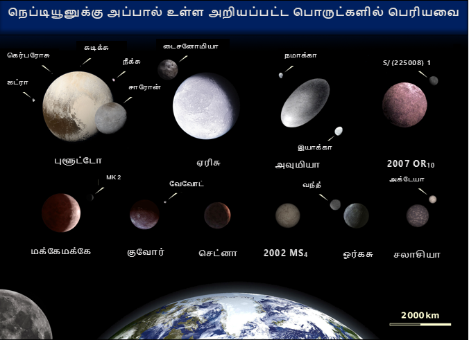 நெப்டியூனில் உள்ள அறியப்பட்ட பொருட்களில் பெரியவை